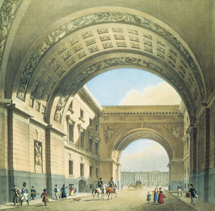 ПроектАркиГенШтаба1